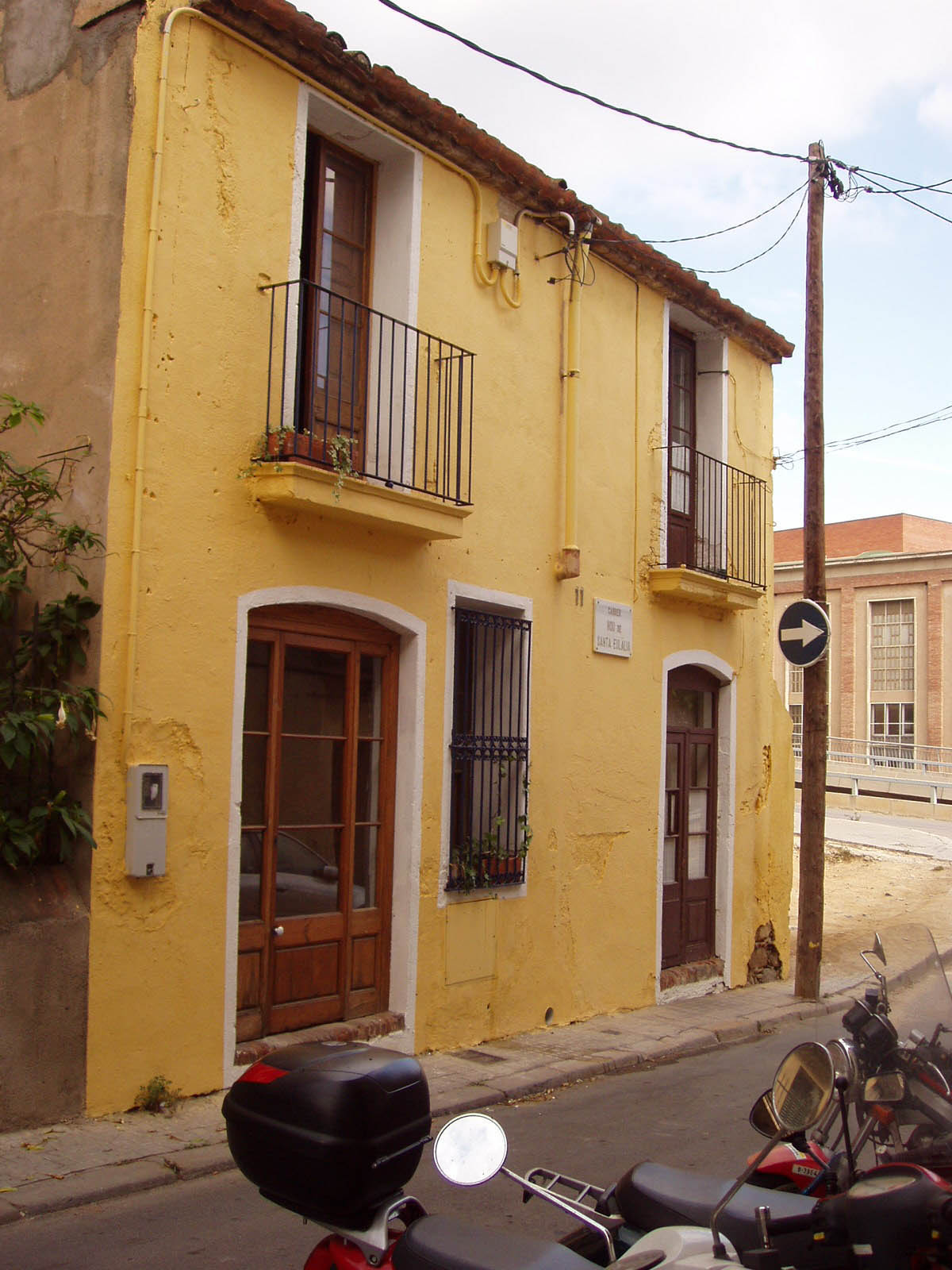 Casa d'un cos. Construcción urbana tradicional en Cataluña. Barrio de Sarriá, Barcelona.